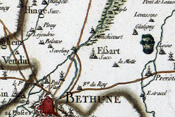 Extrait de la carte de Cassini (région d'Essars)